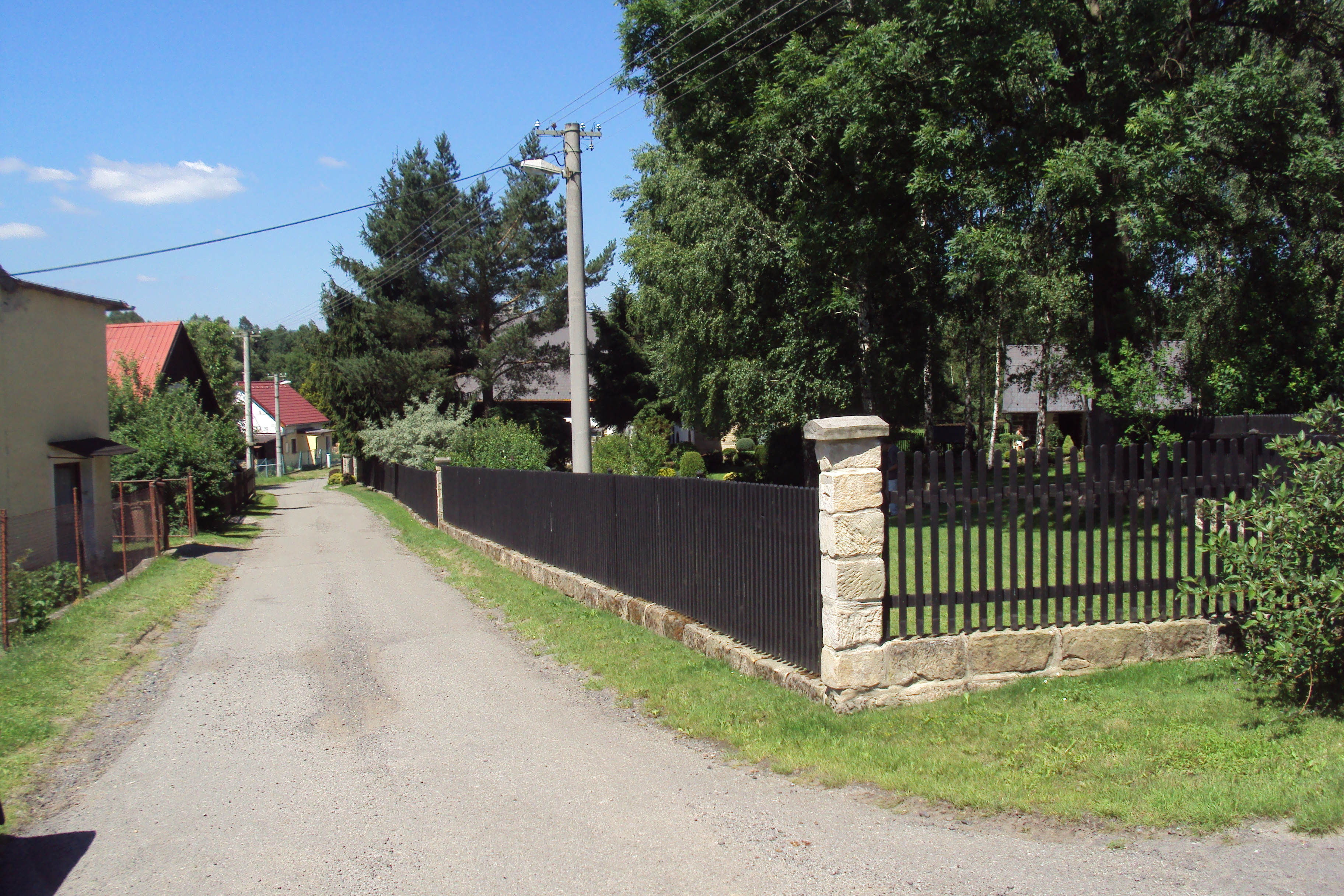 Osada Chomouty je mezi Pihelem a Janovem, částmi Nového Boru